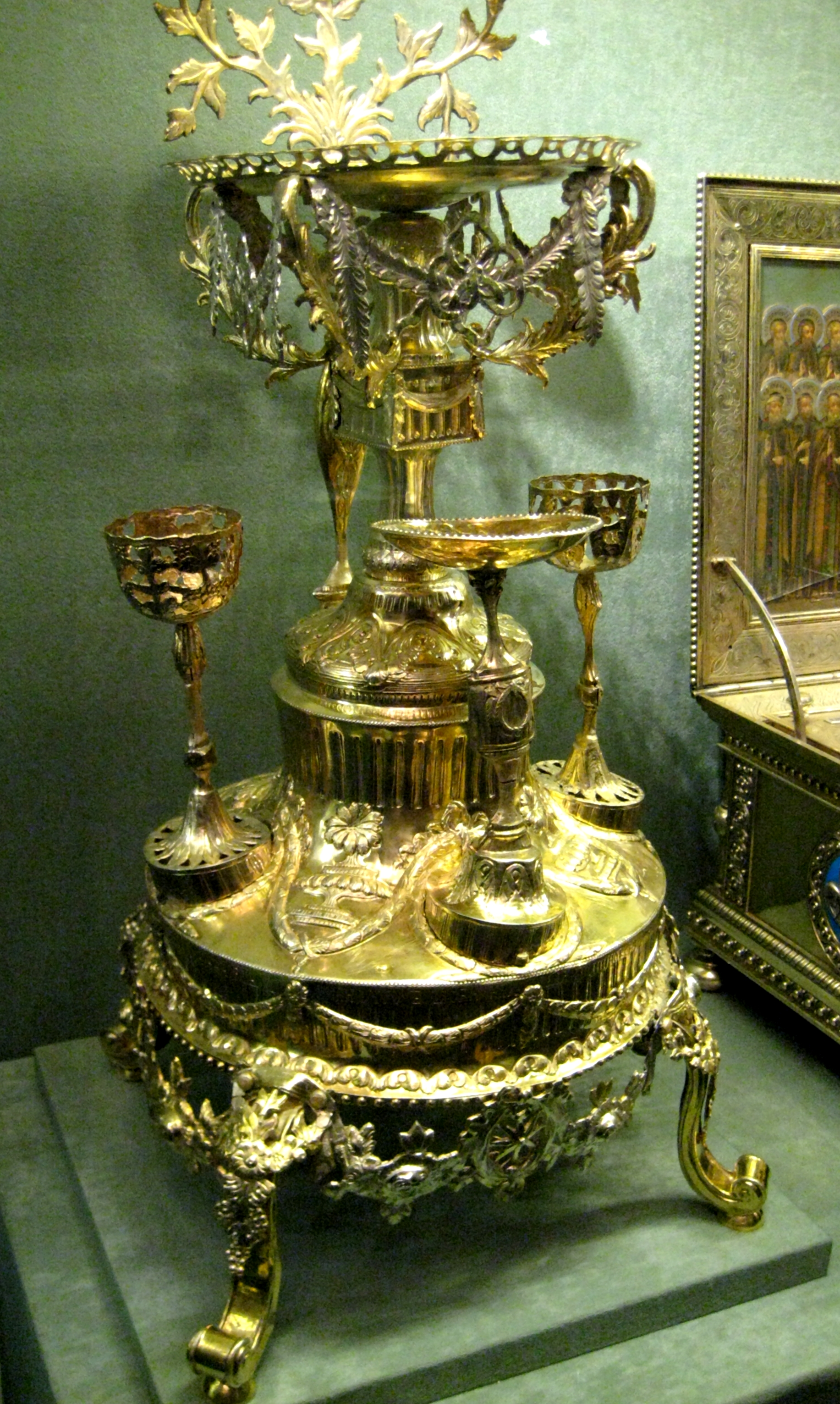 Литийный прибор. Москва, 1789. Серебро, чеканка, гравировка, золочение. На тарели для хлебов изображение: Голгофский крест на фоне града Иерусалима. Надпись: "Се агнецъ божiи в земля и грехи всего мира. Комплект для благословения хлеба, пшеницы, вина и елея.